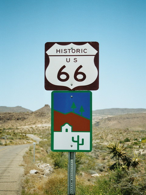 Route 66